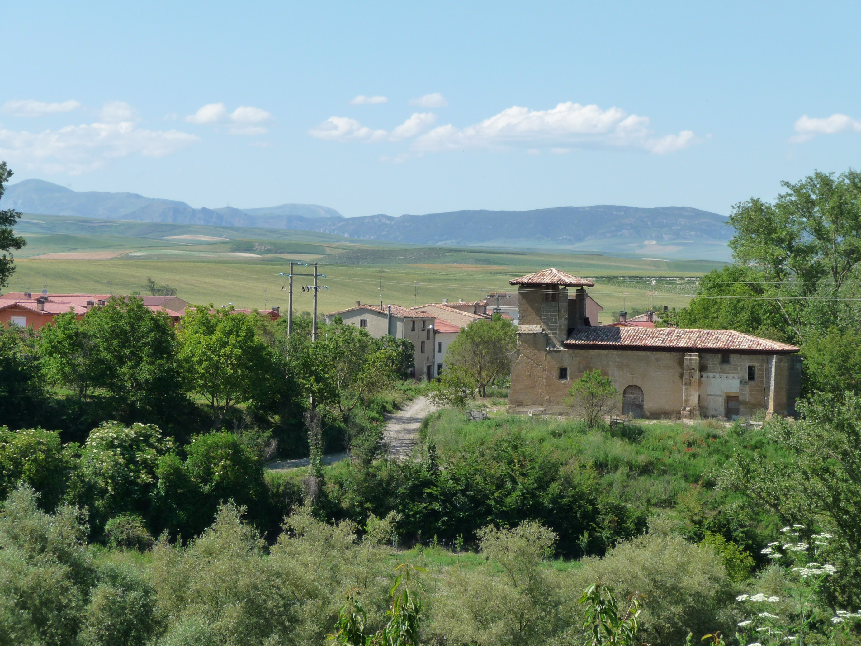 Velasco, barrio de Herramélluri. La Rioja (España)